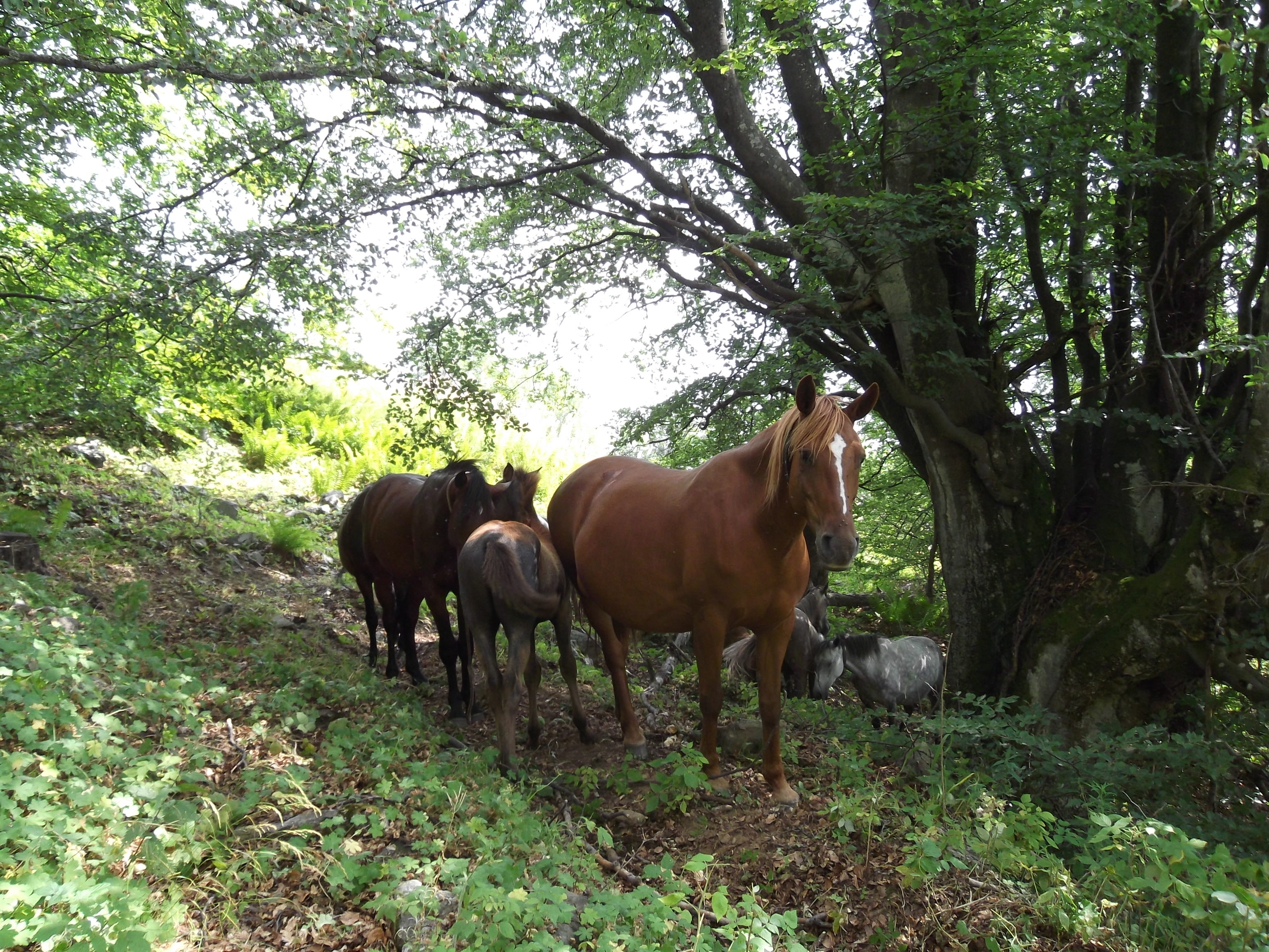 Полудиви коне под вр. Издремец.